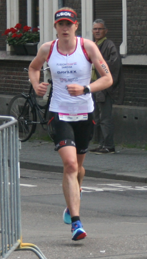 De Vries tijdens Ironman Maastricht 2016